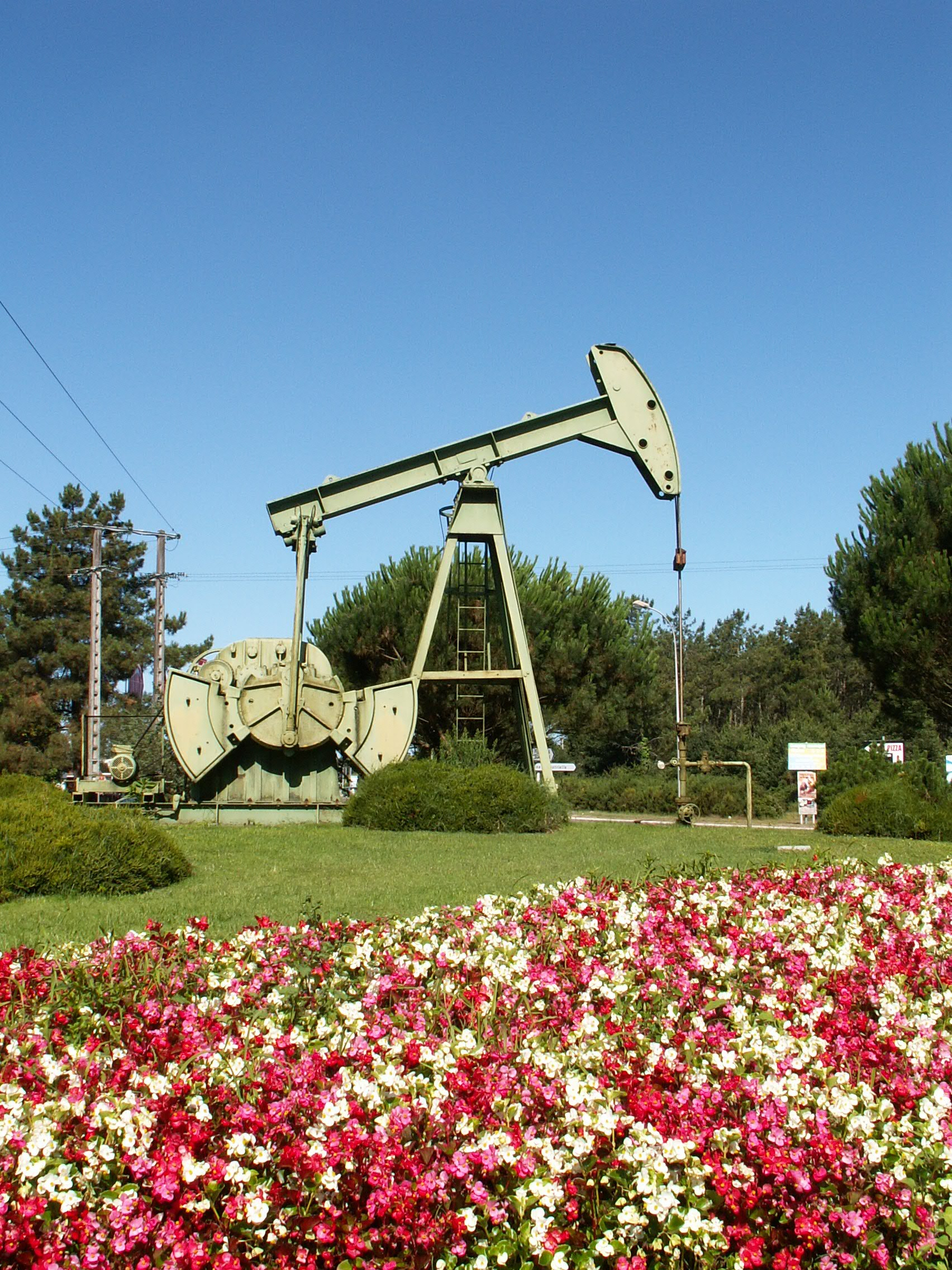 Pompe a tete de cheval.jpg